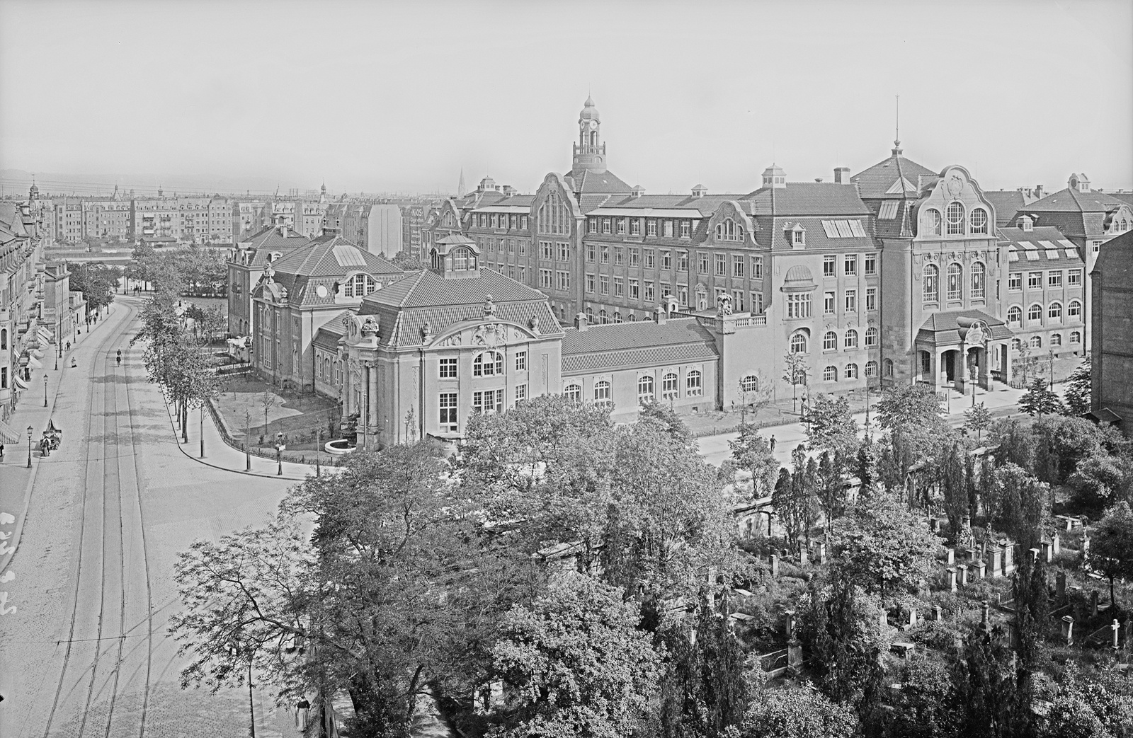 Dresden-Johannstadt, Güntzstraße 34. Kunstgewerbeakademie und Kunstgewerbemuseum (1901/1907; W. Lossow, H. Viehweger). Ansicht über den Eliasfriedhof und entlang der heutigen Gerokstraße um 1915